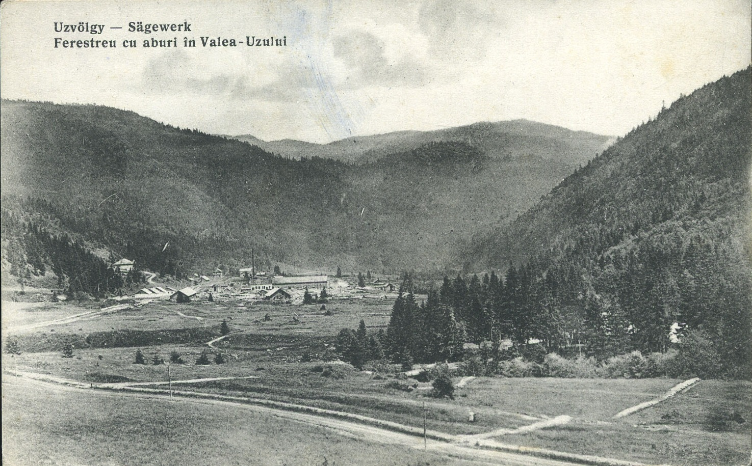 Ferăstrău cu aburi pe Valea Uzului, 1915.